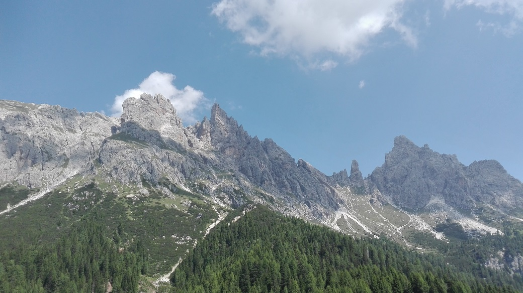 Marmarole dal rifugio Bajon